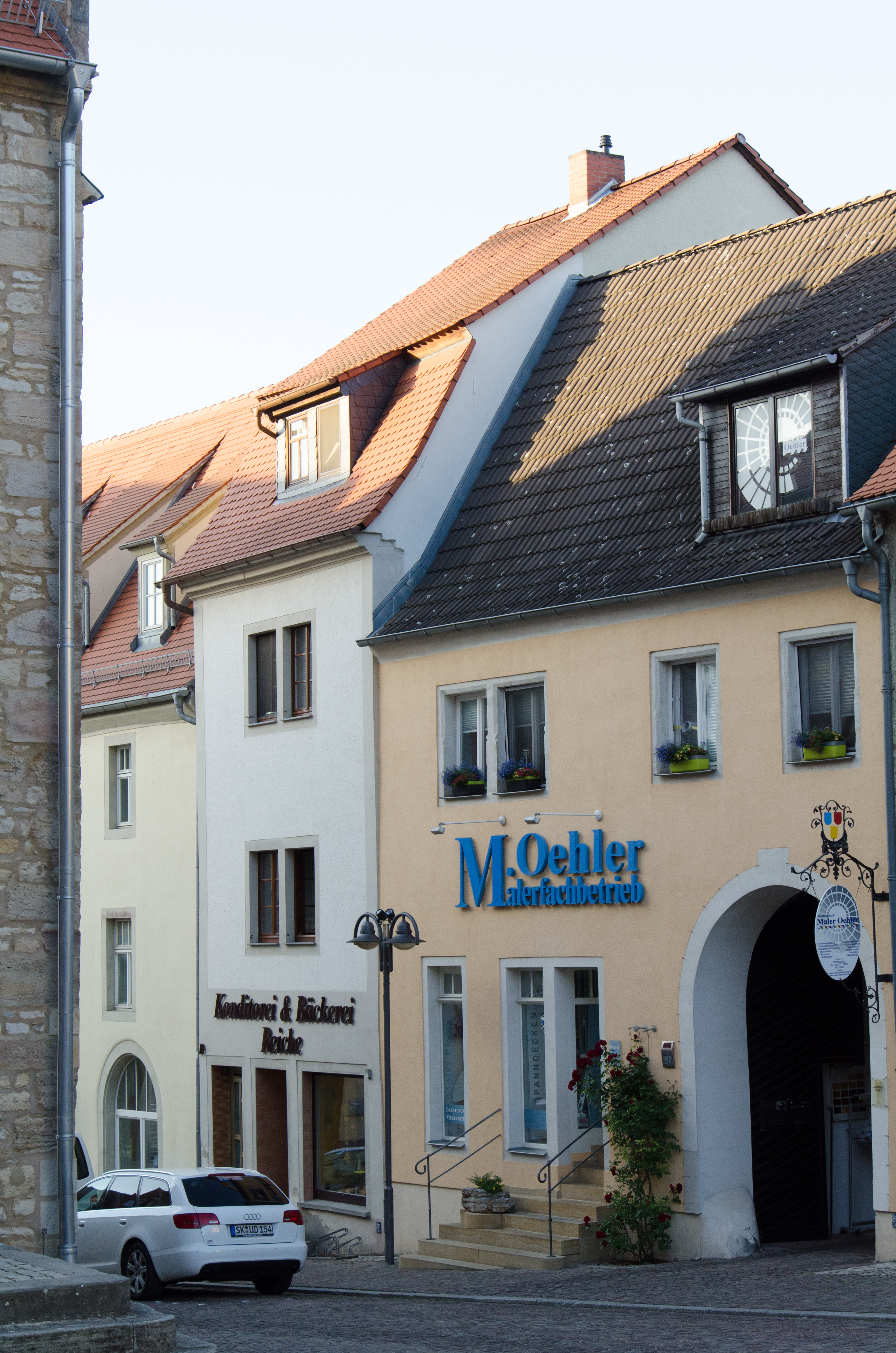 Querfurt, Markt 10, 11